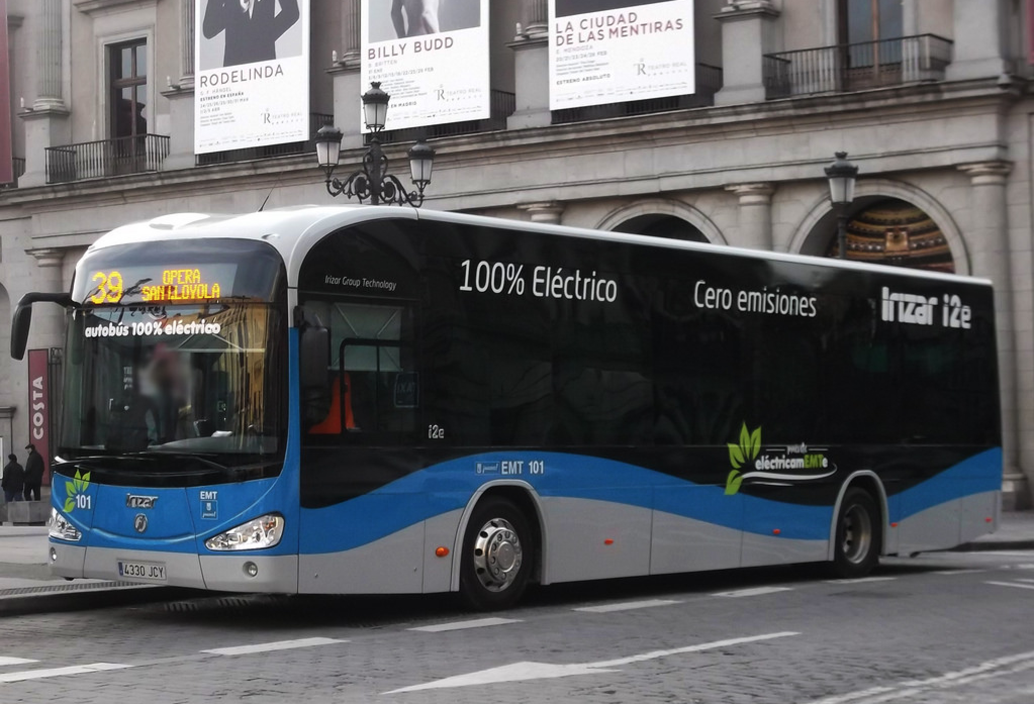 Autobús eléctrico modelo Irizar i2e de la Empresa Municipal de Transportes de Madrid